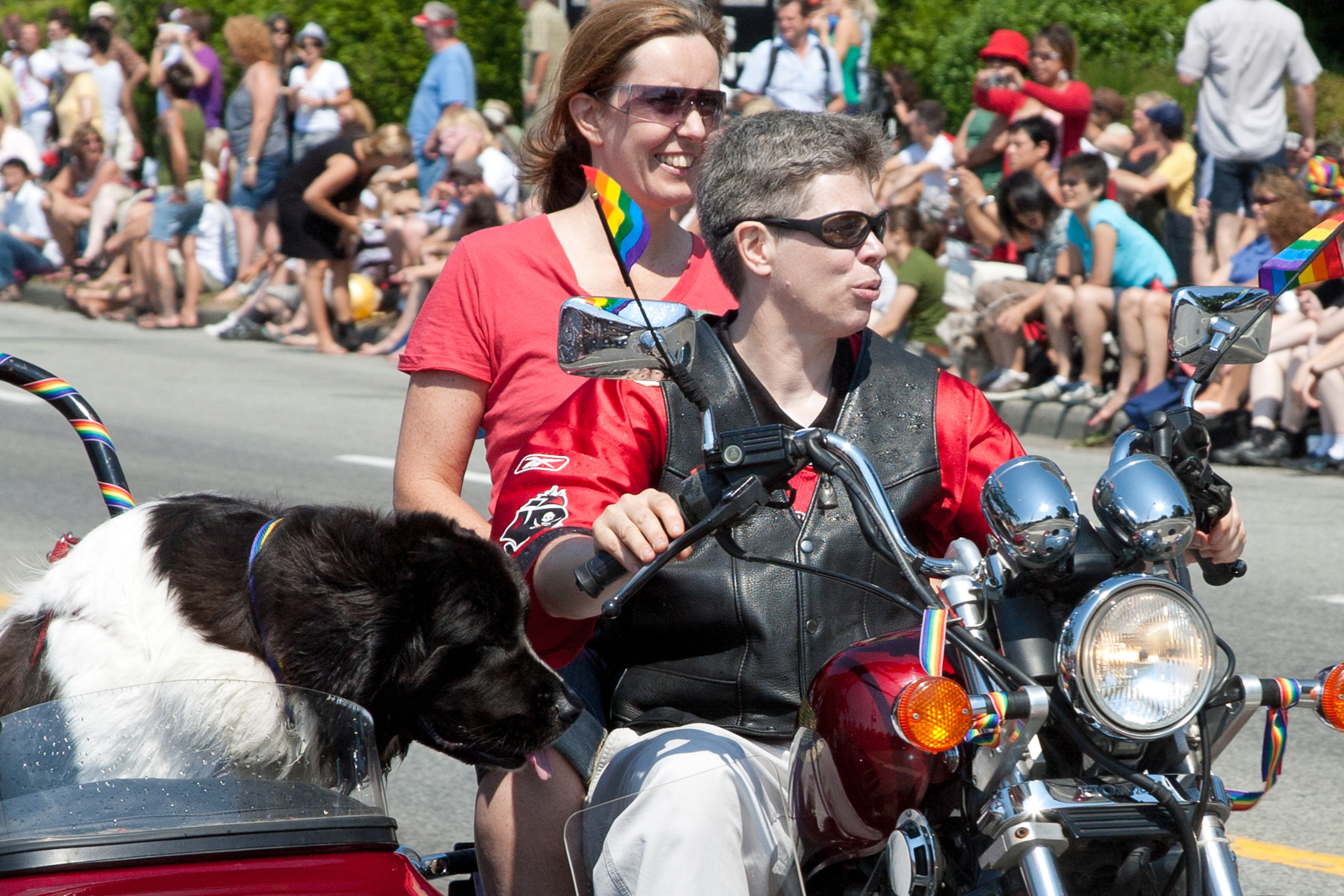 Vancouver Pride 2009